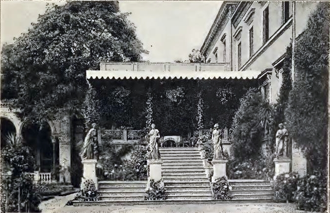 Villa Borsig in Berlin Moabit, Gartenanlage, Veranda mit Freitreppe, links Loggia